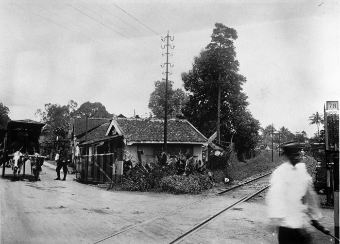 Foto. Politiepost Kottalama in Malang.